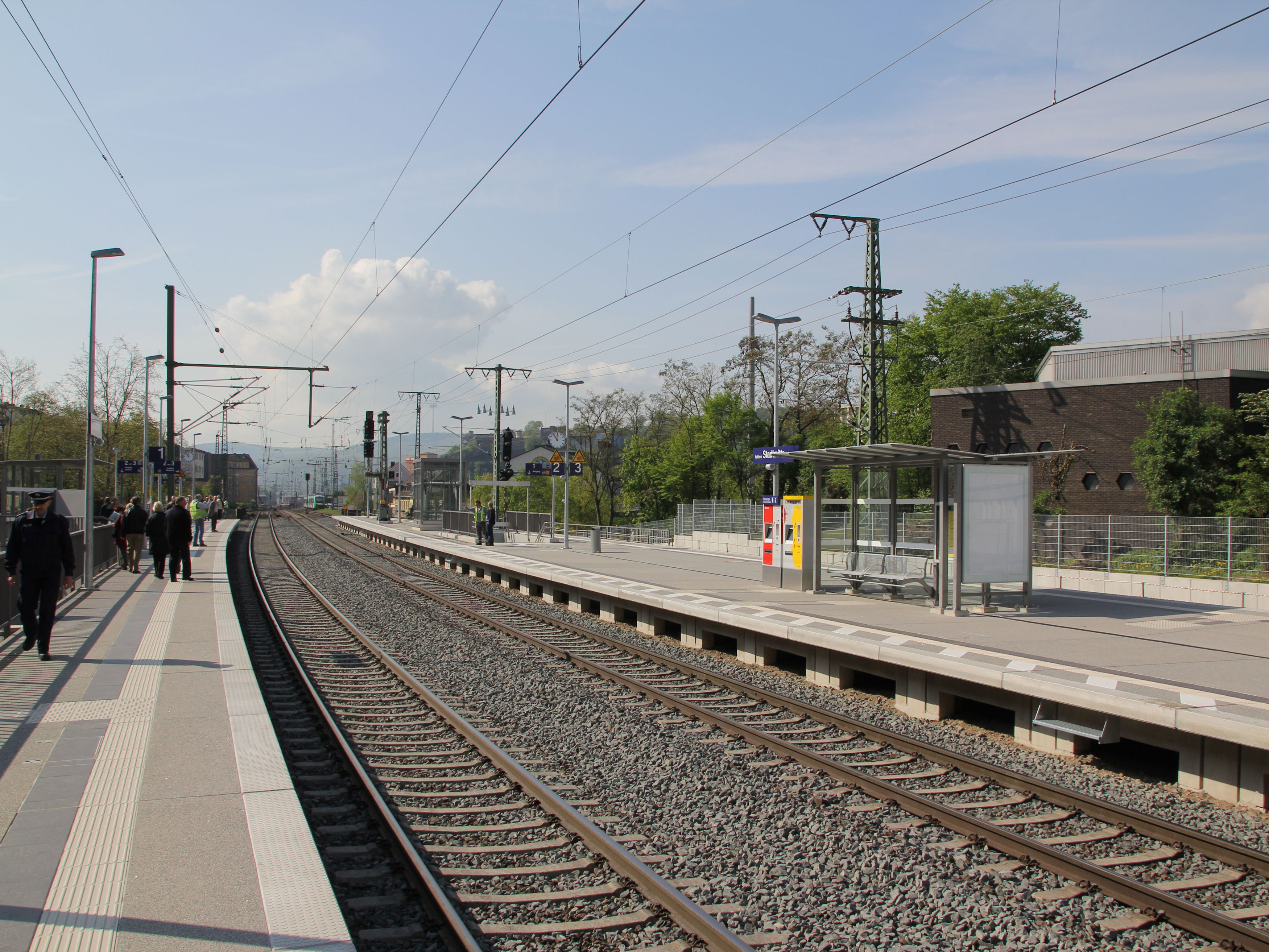 Koblenz im Buga-Jahr 2011 - Eröffnung des Haltepunkts Koblenz Stadtmitte